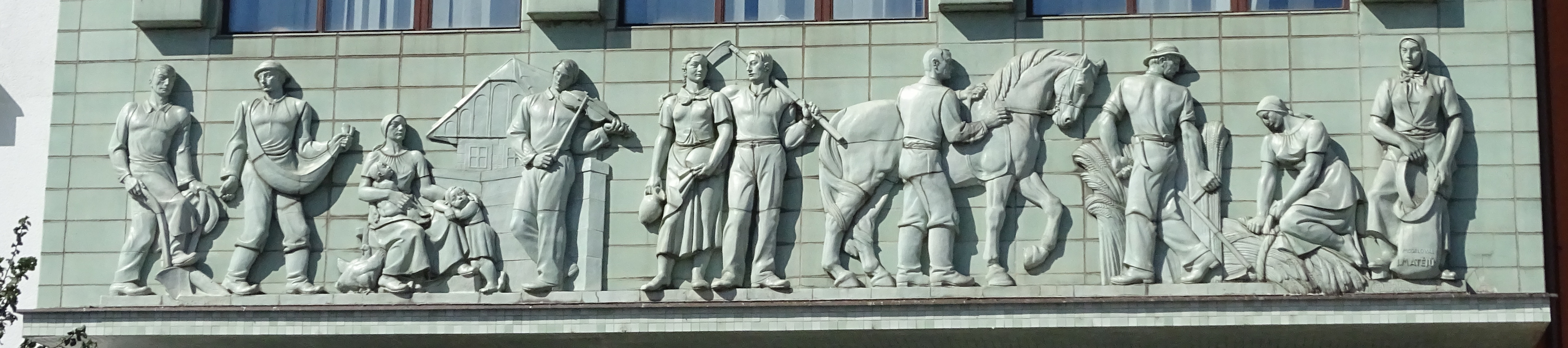 Keramický reliéf sochaře Josefa Matějů znázorňující život a zemědělské práce na Přešticku. Budova Spořitelny v Přešticích.